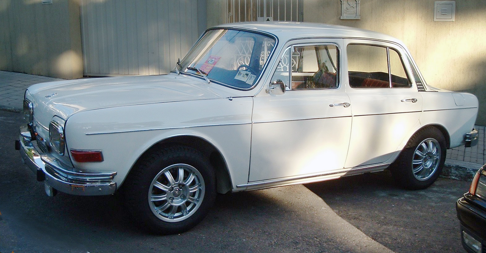 1969 or 1970 Volkswagen 1600 4-door, Brazil